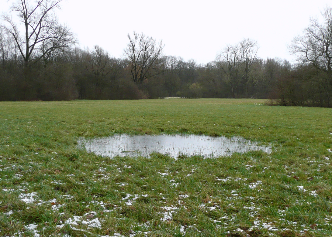 Bombentrichter im Hermann-Löns-Park in Hannover